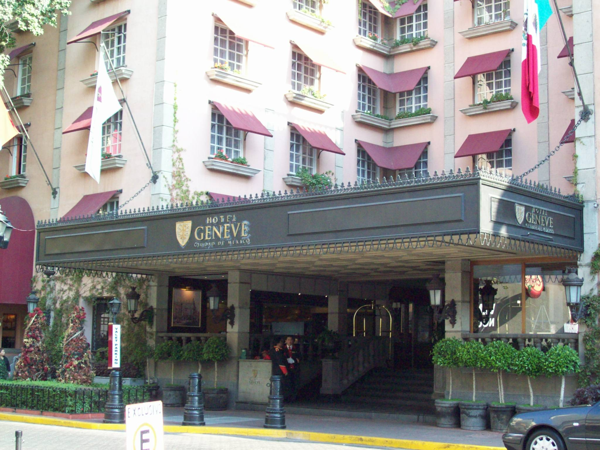 Hotel Geneve, Mexico D.F.